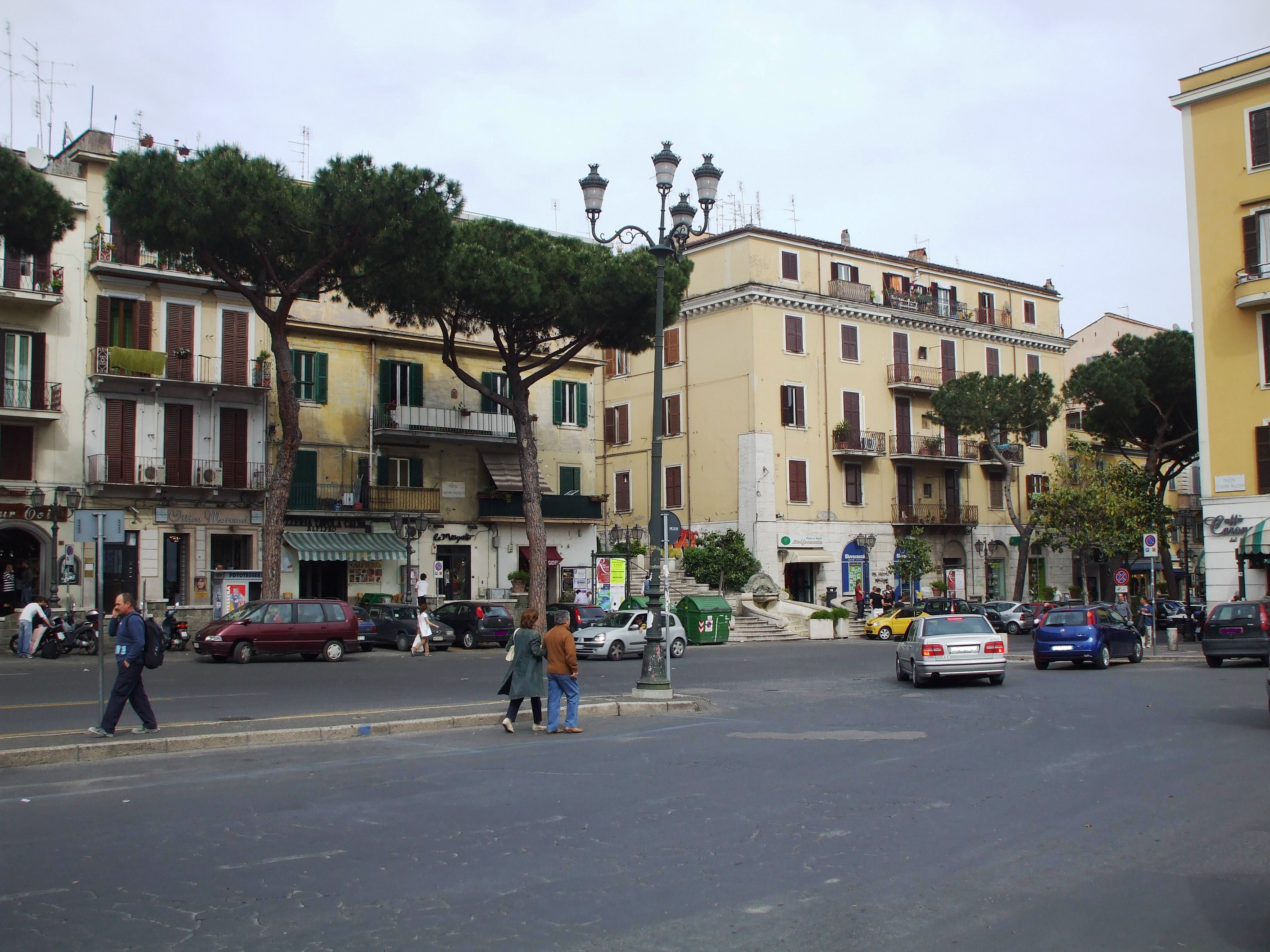 Albano Laziale - P.zza Mazzini verso Corso Matteotti